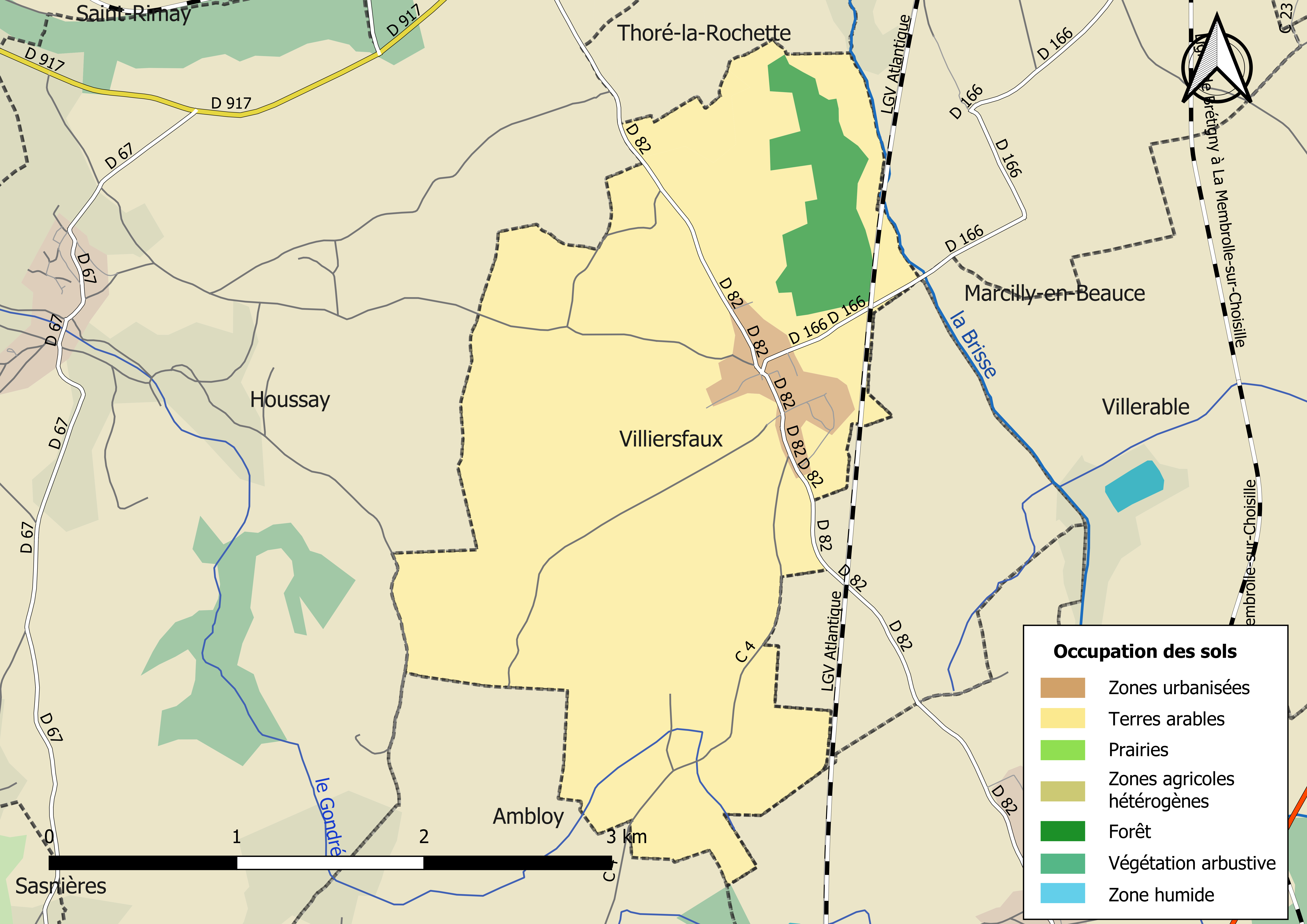 Carte des infrastructures et de l’occupation des sols en 2018 de la commune de Villiersfaux (France).